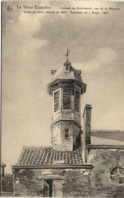 Vieux Couvent du Berlaimont à la rue de la Régence. Aquarelle J. Baes ) 1887